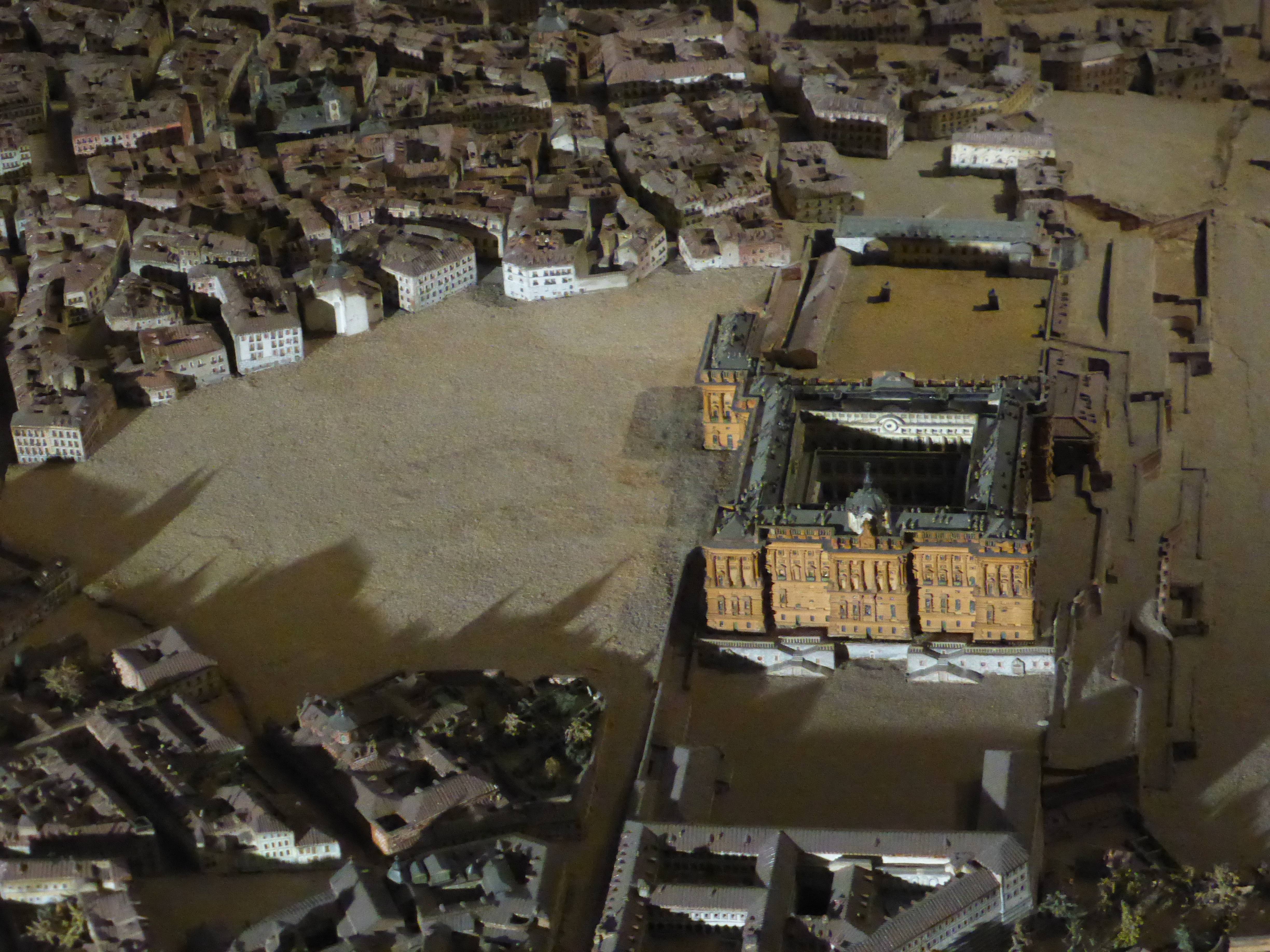 En la maqueta conocida como "Modelo de Madrid", del ingeniero militar León Gil de Palacio, construida entre los años 1828 y 1830, se encuentra la representación del Palacio Real y sus alrededores, con una explanada generada por derribos en época napoleónica. Antes de la urbanización de la Plaza de Oriente. MUSEO DE HISTORIA DE MADRID.